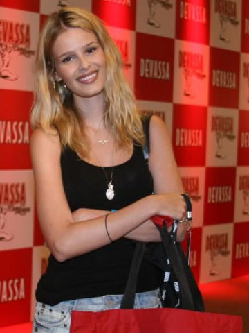 A modelo Yasmin Brunet foi retirar a camiseta que dá acesso ao camarote de uma cervejaria no Carnaval do Rio de Janeiro.